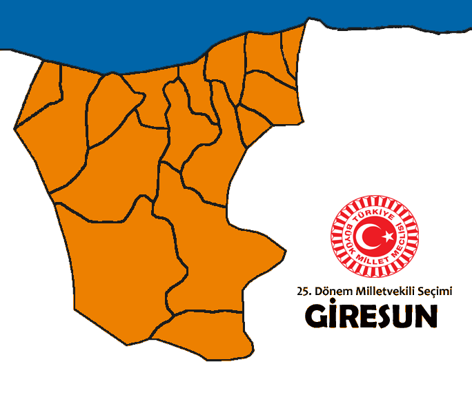 2015 genel seçim sonuçları